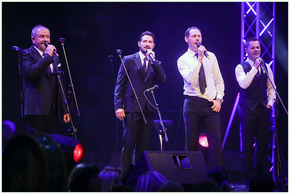 Čuki na Noči Modrijanov 2013.